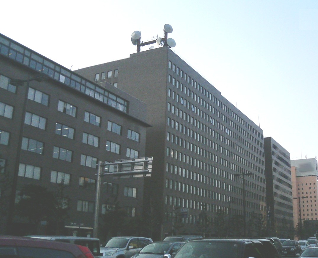 九州電力本社ビル（電気ビル）。 2006年1月28日に投稿者自身が撮影。